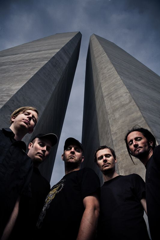 FDK promo